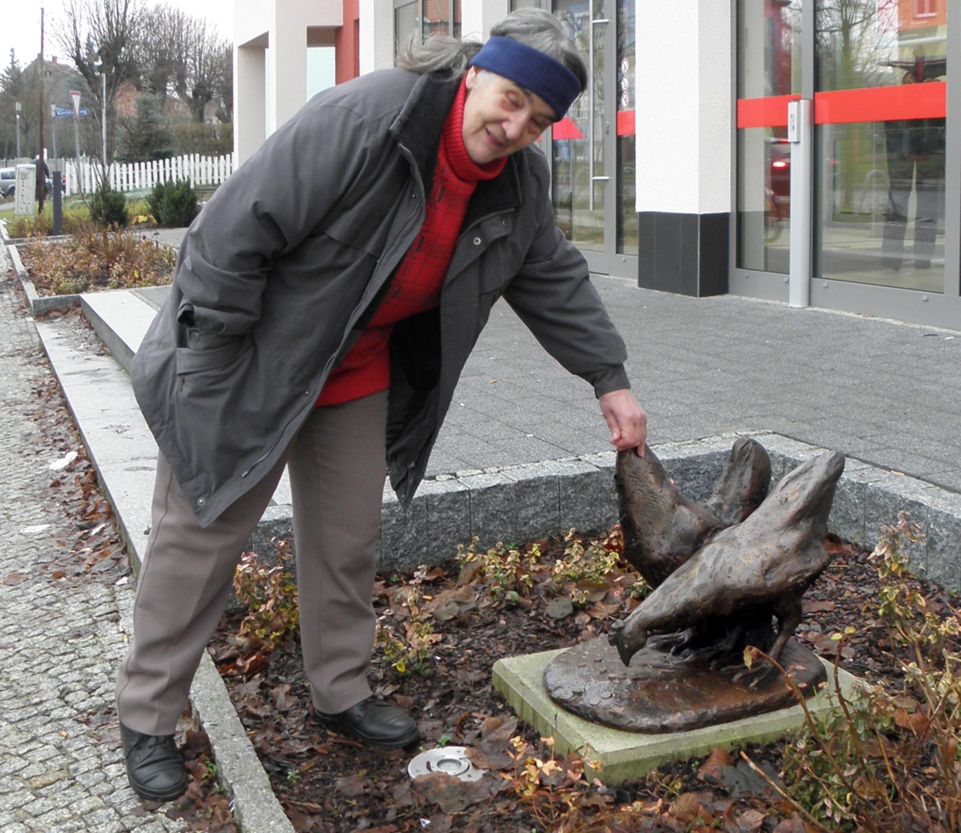 Biesenthal, Bildhauerin Margit Schötschel vor ihren Hühner-Skulpturen